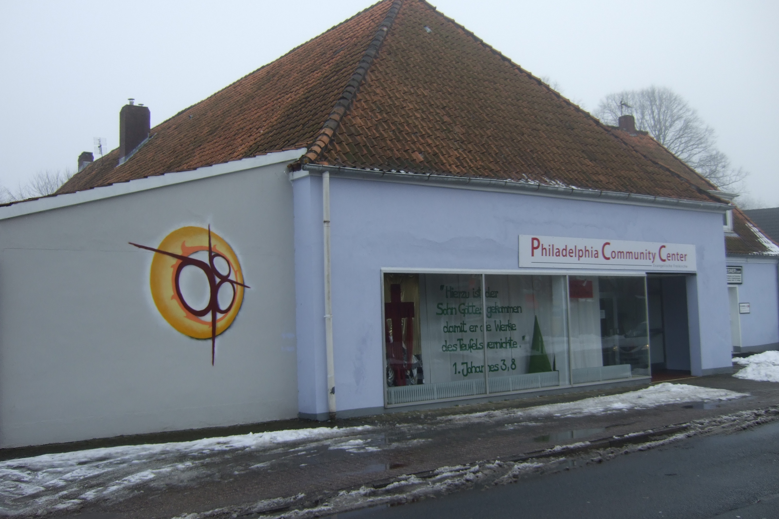 Gemeindezentrum der Philadelphia Community Church Norden